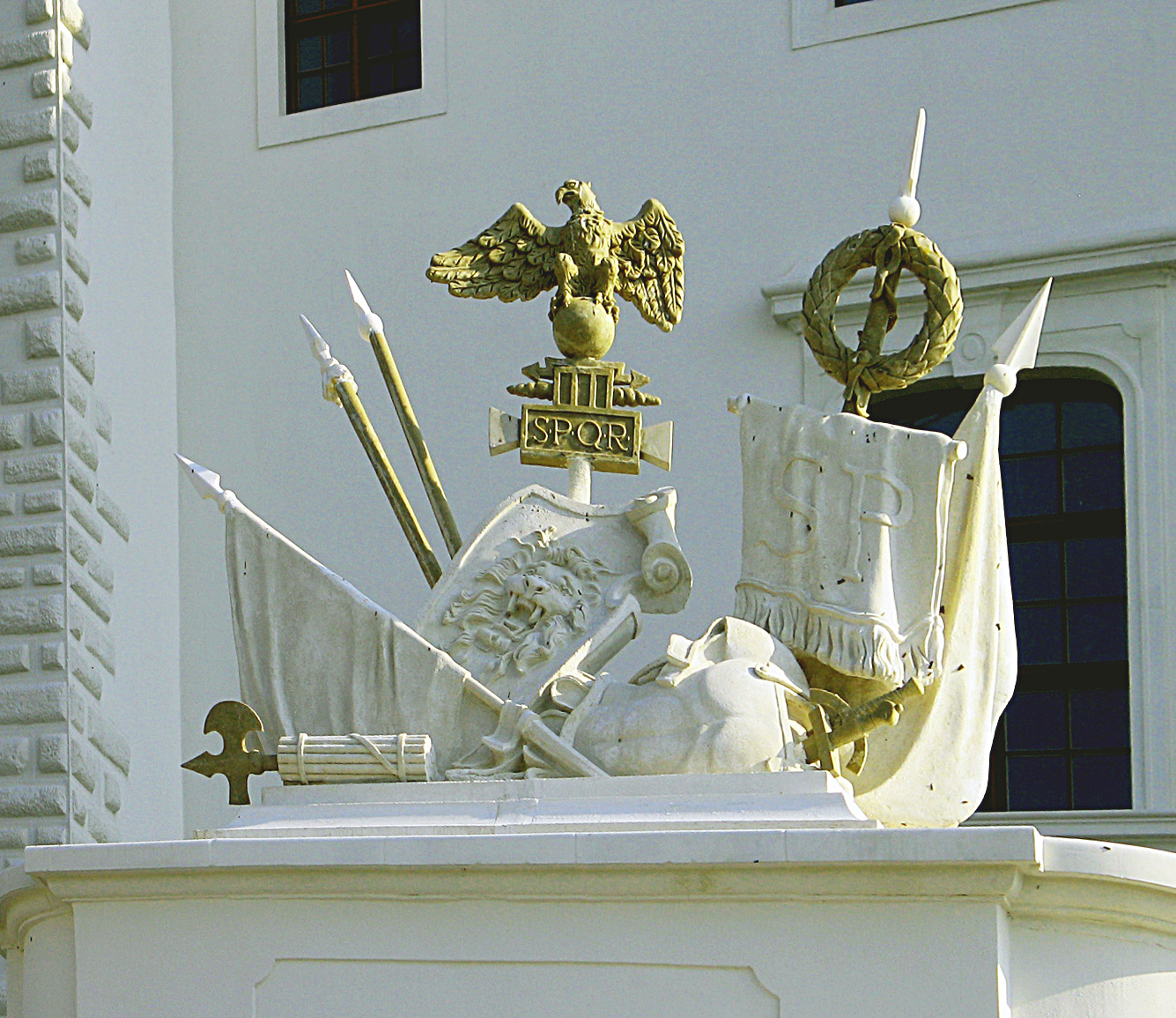 Detail zo vstupného portálu na zrekonštruovanom bratislavskom hrade